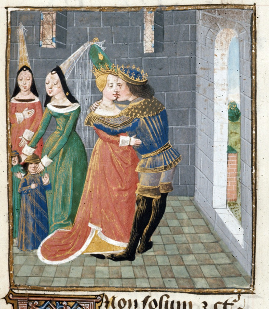 Agatocle, tiranno di Siracusa, bacia la vedova di Damas. British Library, Londra.